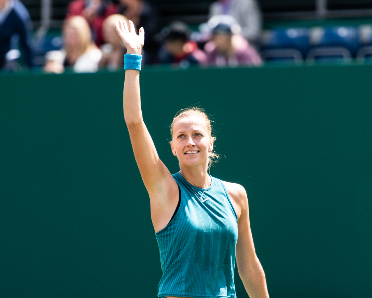 Petra Kvitova